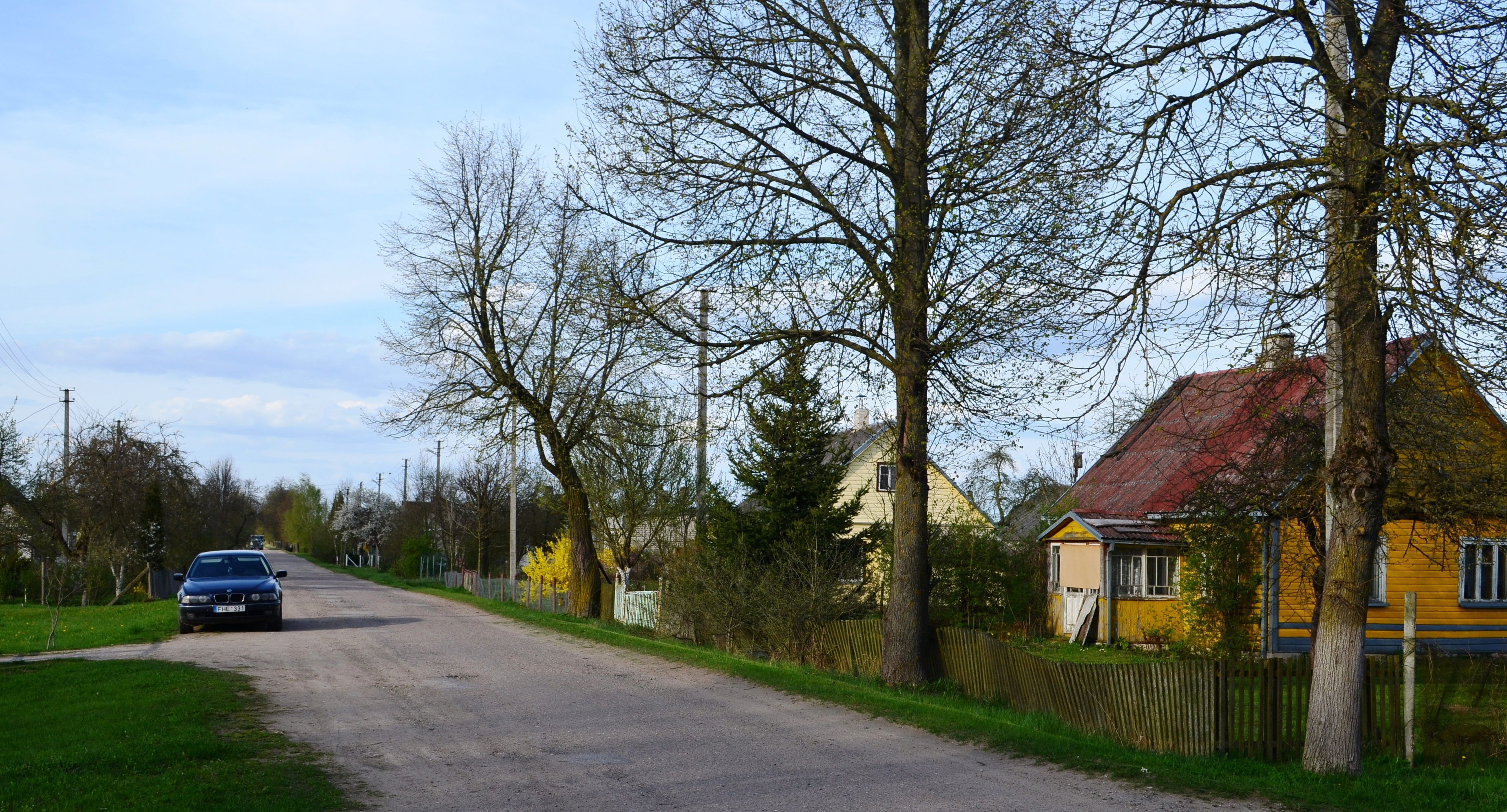 Stasinės k., Kėdainių raj.